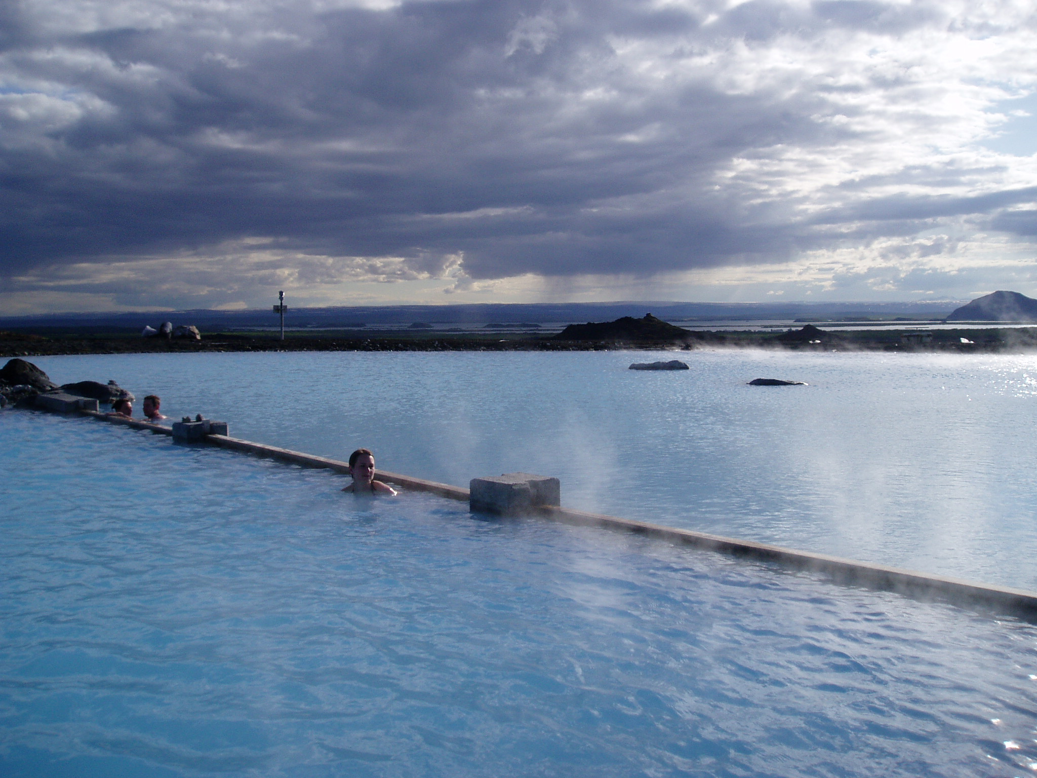 Le Blue lagoon à Grindavik (Islande)